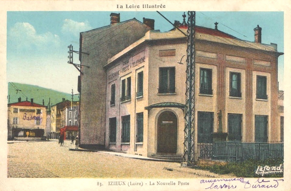 Izieux, le nouvel hôtel de la Poste. Environ 1930.